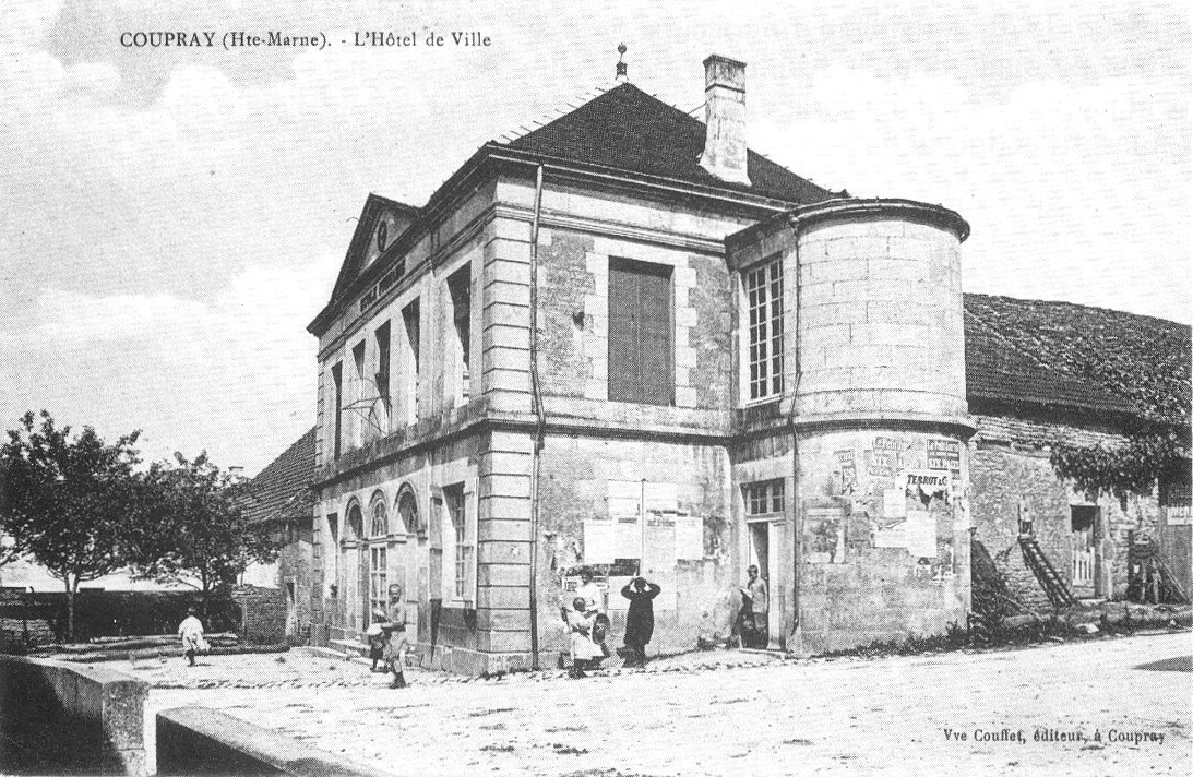 Carte postale ancienne L'Hôtel de Ville de Coupray, Haute-Marne, France